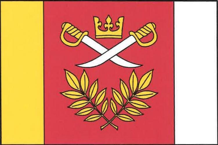 Čistěves vlajka